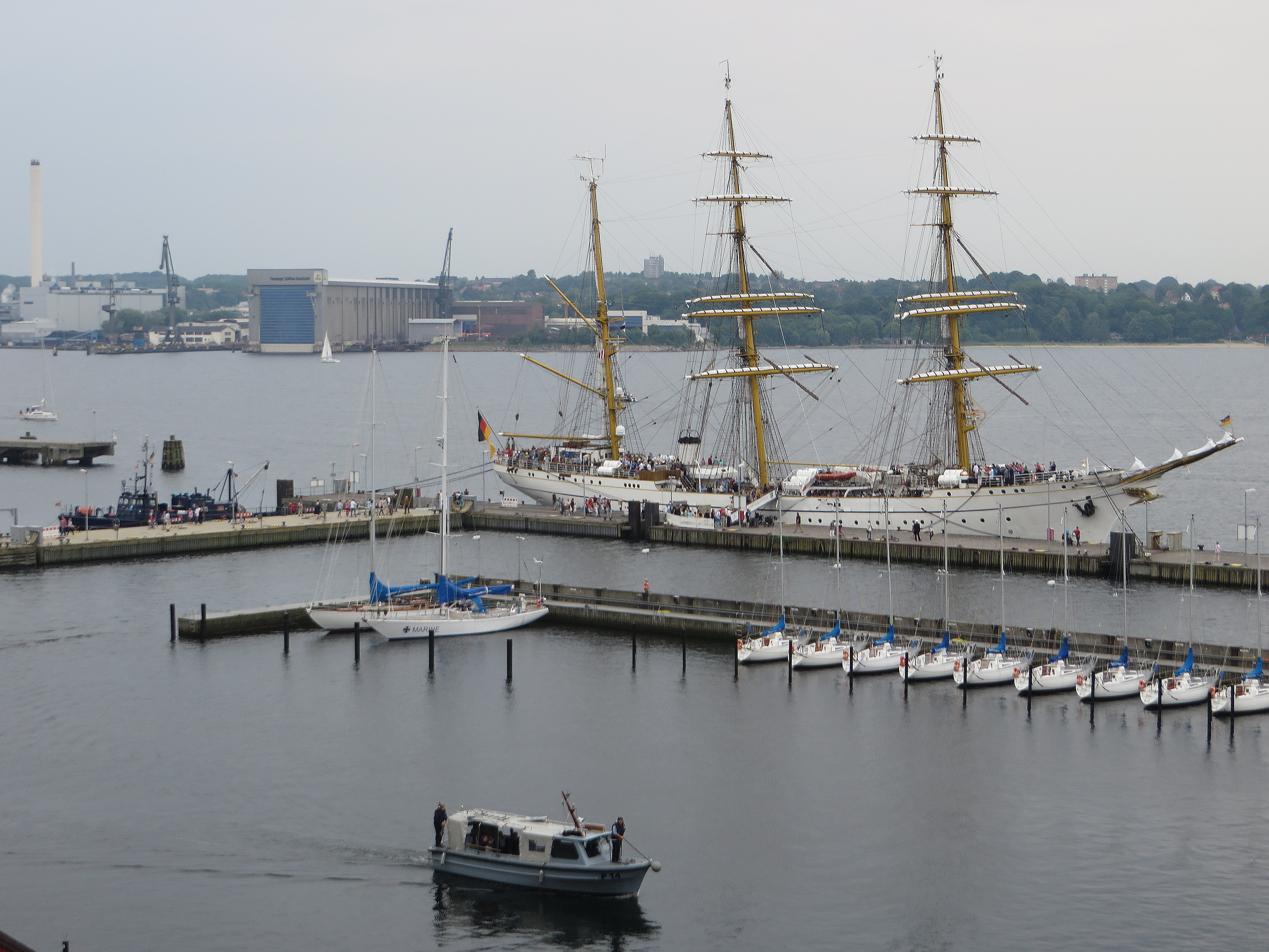 Gorch Fock im Bootshafen der MSM, Tag der Bundeswehr 2015, Bild 13